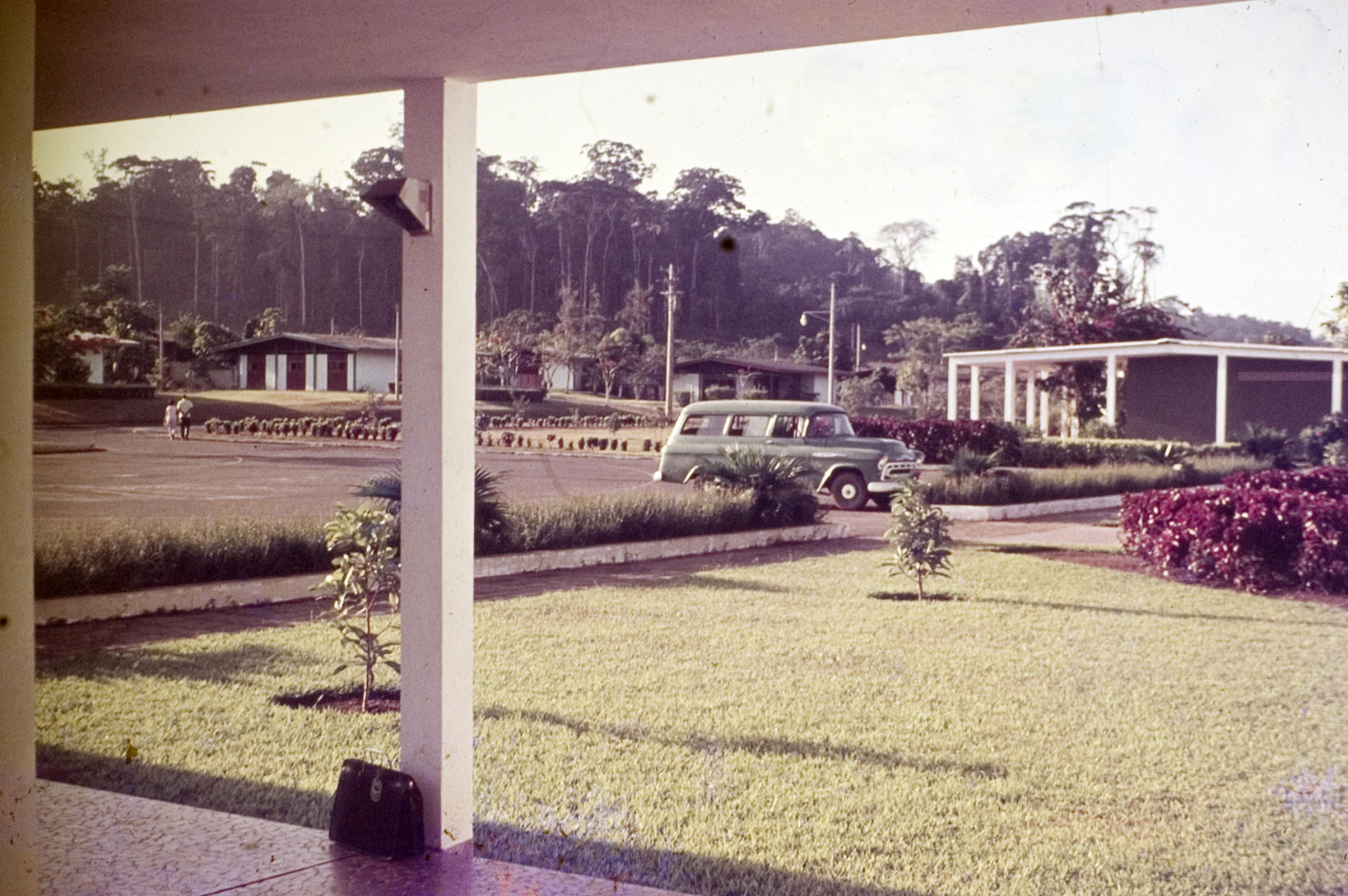 Hotel - Serra do Navio - Amapá / Outubro de 1965 (Brazil)